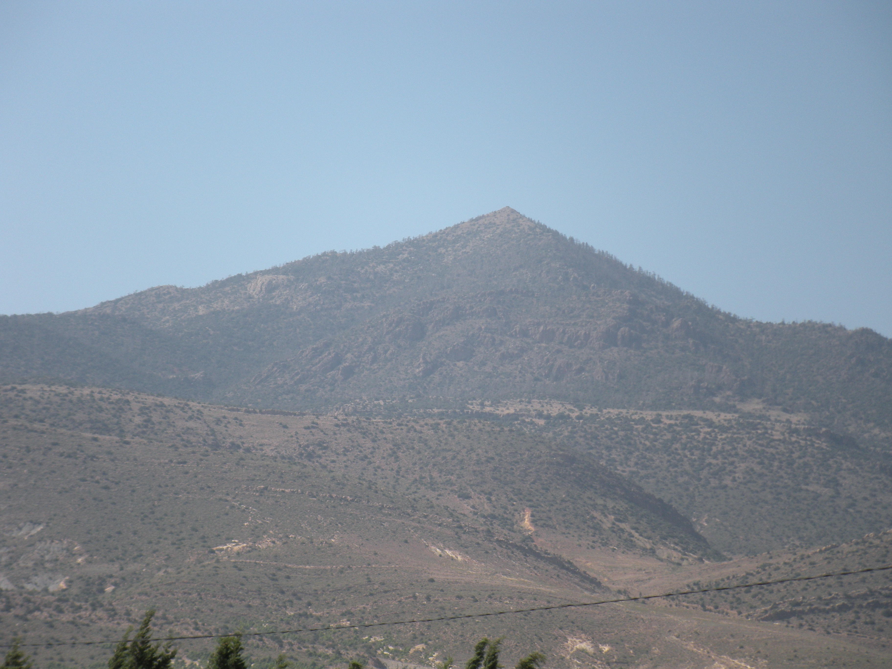 Mont Belezma et entrée du Parc du même nom